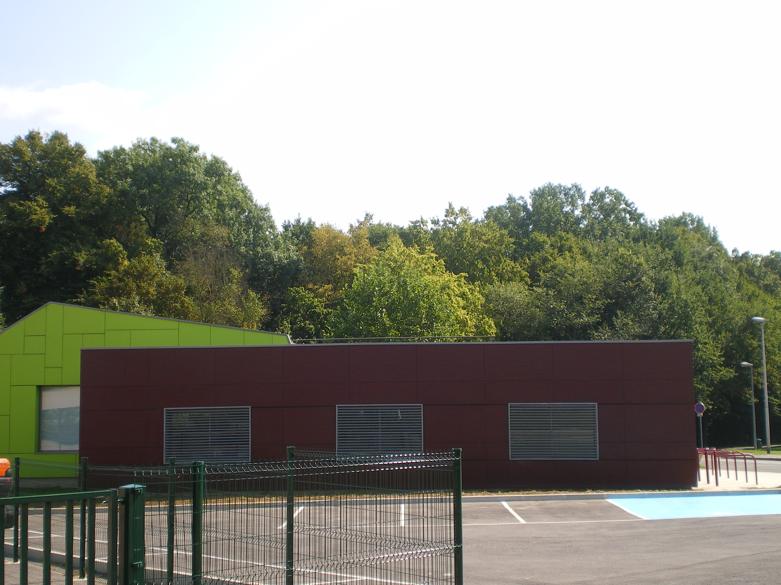 Maison des Jeunes de Croissy Beaubourg